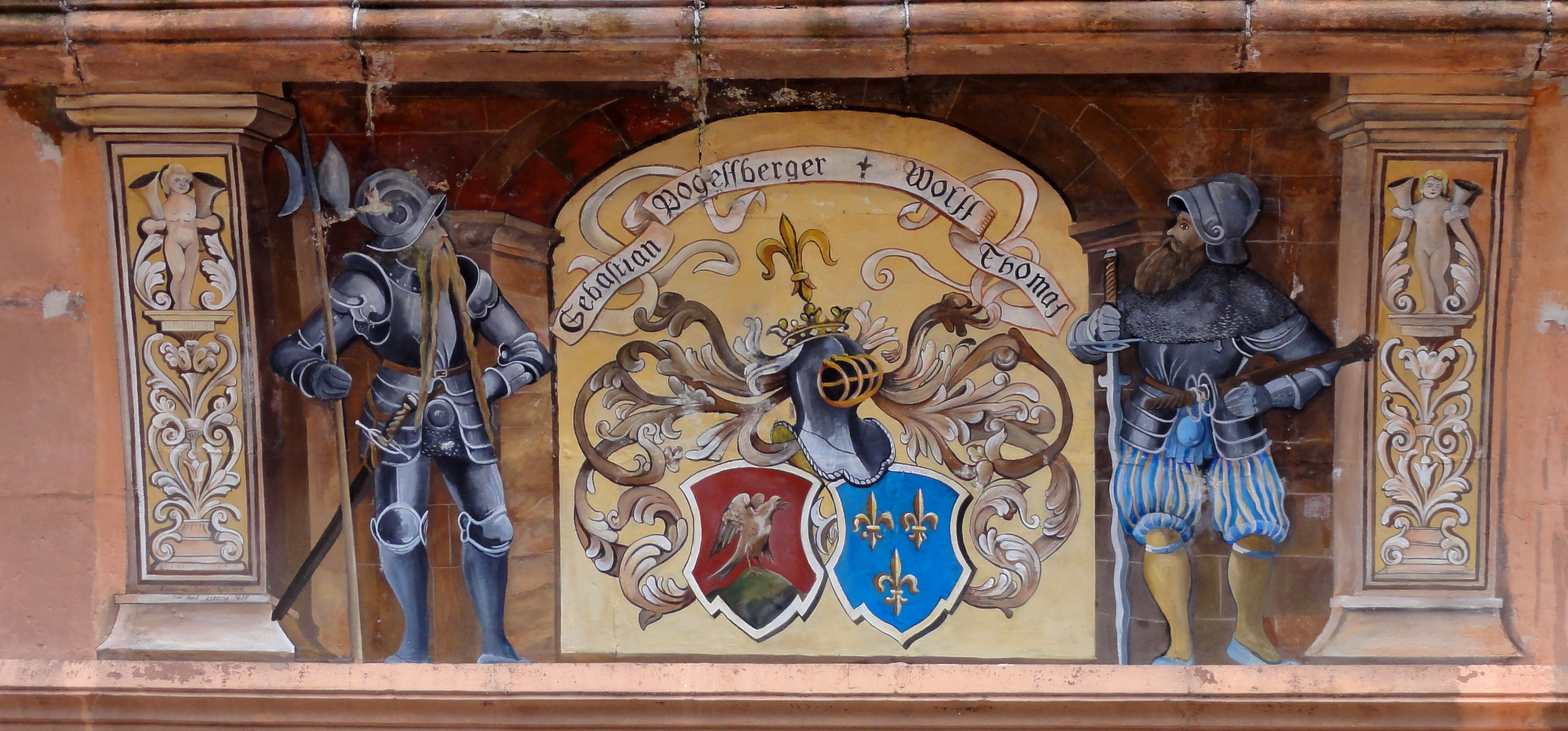 Alsace, Bas-Rhin, Wissembourg, Maison Vogesberger (1540), 2 quai Anselmann (PA00085254, IA67008079).